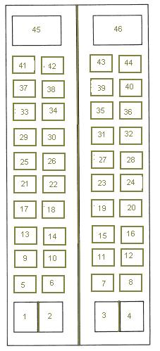 fatta da me con paint si nota soprattutto dal fatto che ha molti difetti